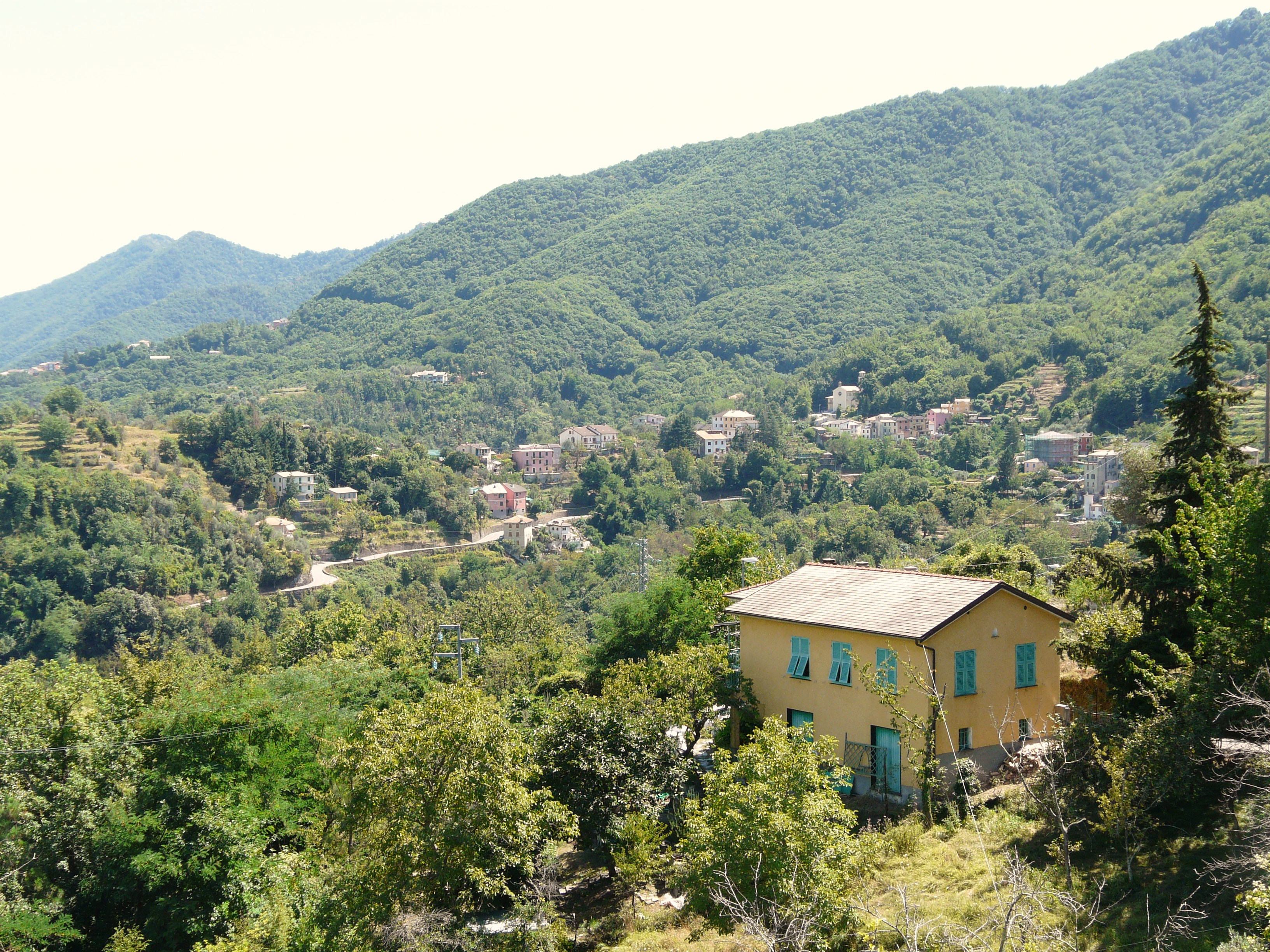 Panorama della frazione di Cassanesi, Tribogna, Liguria, Italia